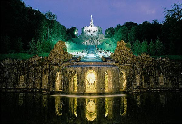 Nächtliche Wasserspiele Kassel im Bergpark Wilhelmshöhe mit Herkules und Kaskaden Quelle: kasselgalerie.de (selbst fotografiert) Fotograf: Malte Ruhnke 22:30, 19. Jul 2005 MalteRuhnke 600 x 409 (70618 Byte) (Nächtliche Wasserspiele Kassel im Bergpark Wilhelmshöhe mit Herkules und Kaskaden Quelle: kasselgalerie.de (selbst fotografiert) Fotograf: Malte Ruhnke GFDL ) 21:59, 19. Jul 2005 MalteRuhnke 600 x 409 (70618 Byte) (Nächtliche Wasserspiele Kassel im Bergpark Wilhelmshöhe mit Herkules und Kaskaden Quelle: kasselgalerie.de (selbst fotografiert) Fotograf: Malte Ruhnke)